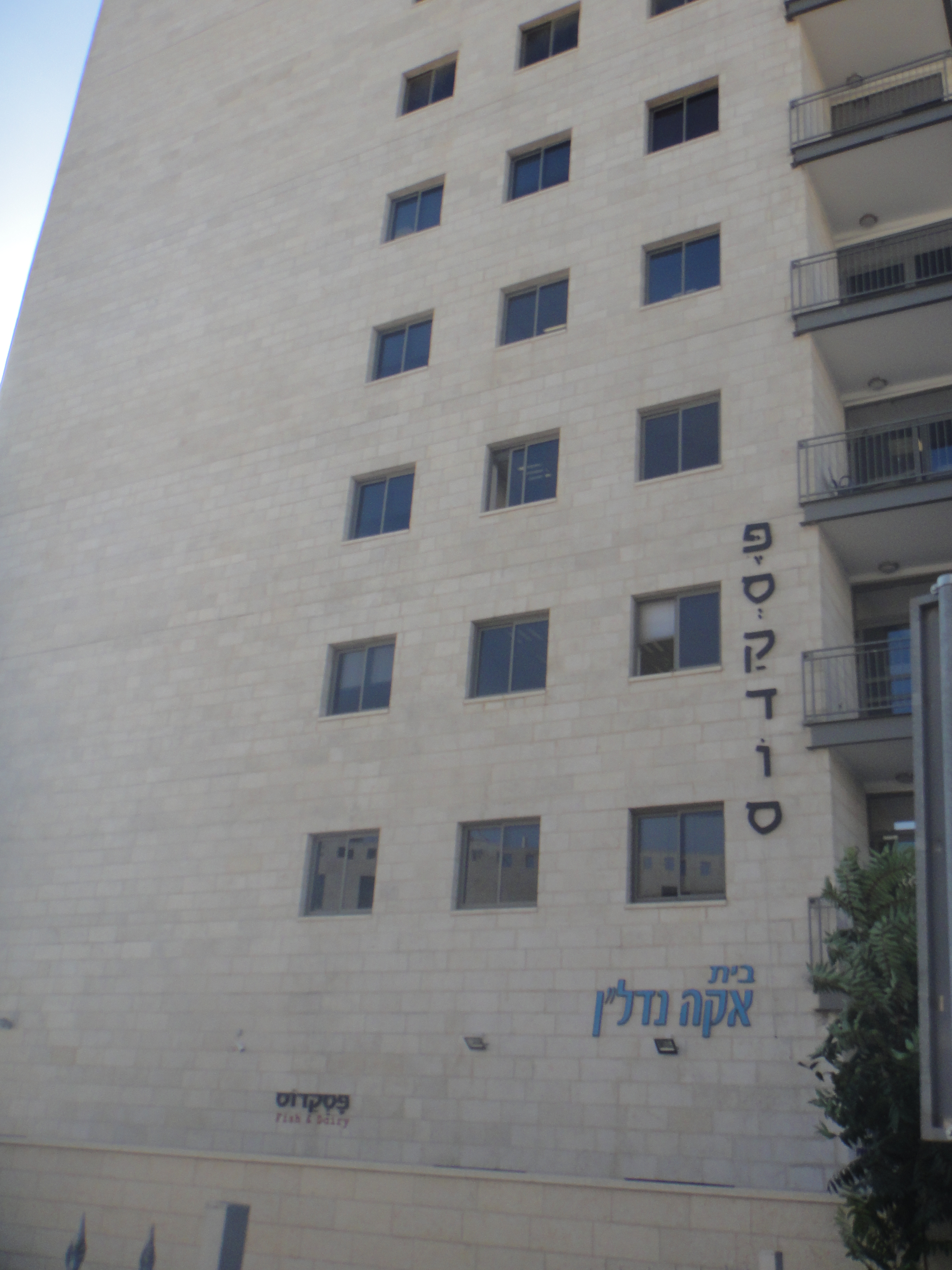 מרכז קרן תקוה בירושלים